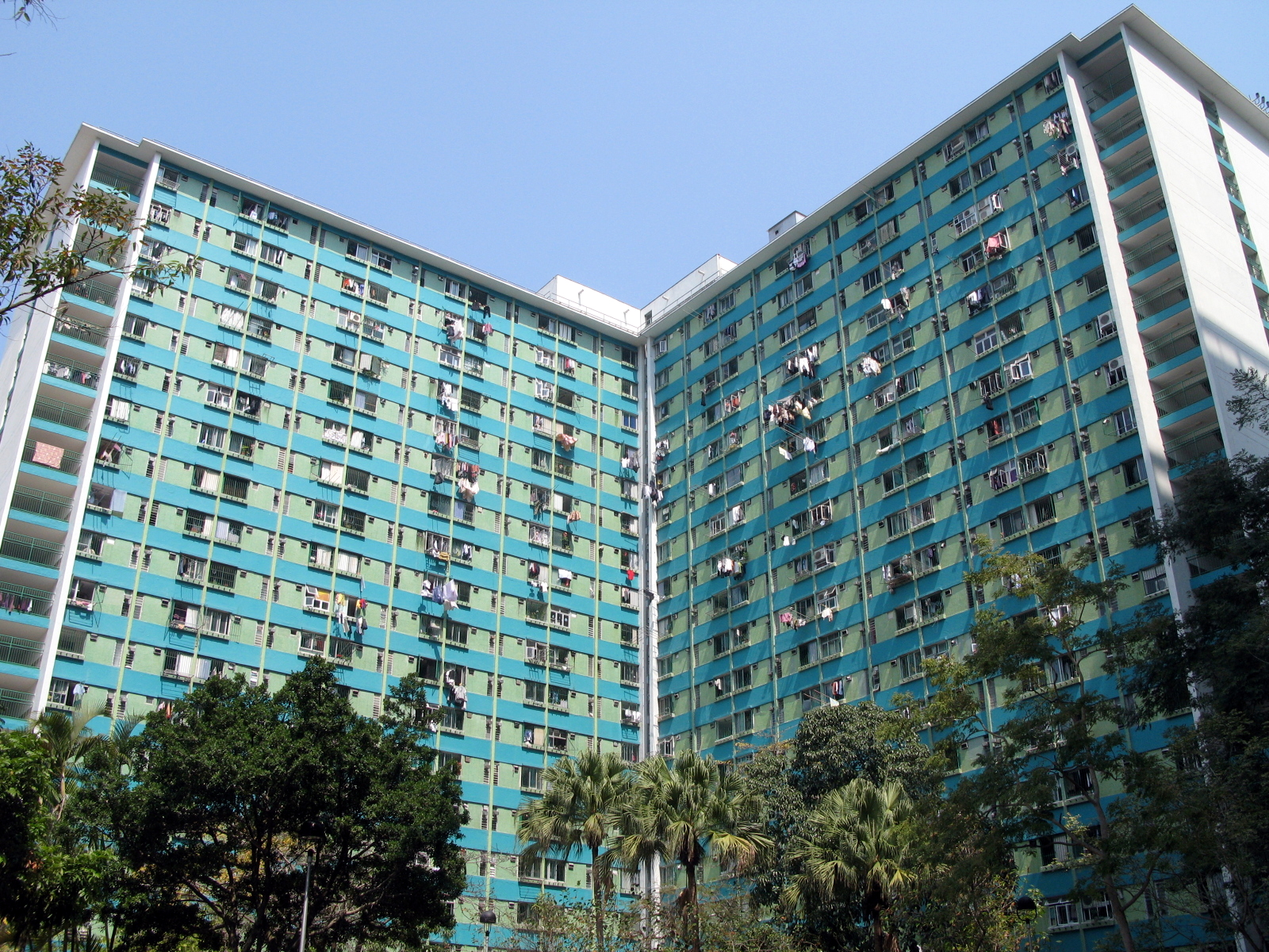 HK Mei Lam Estate Mei Yeung House